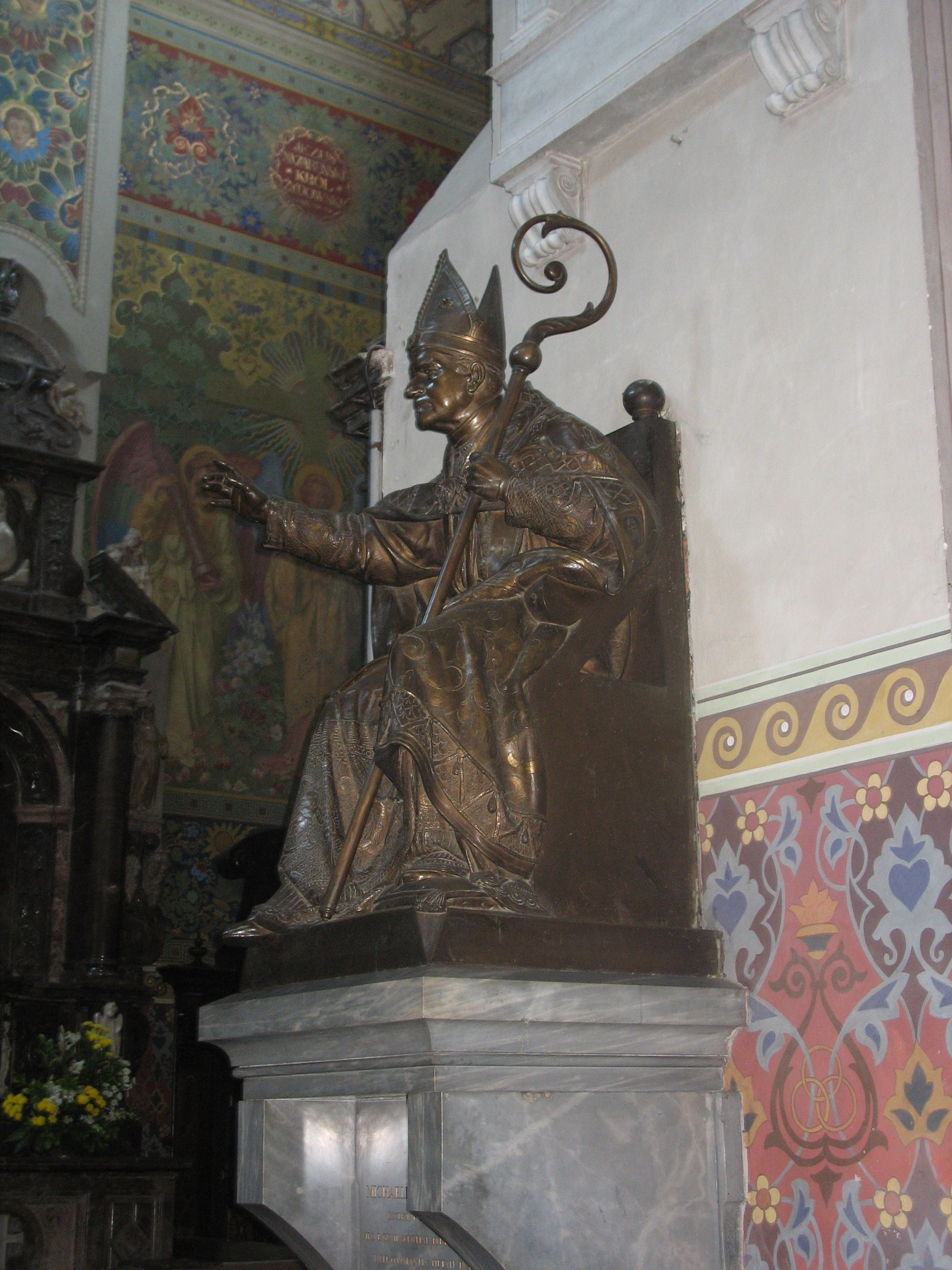 Pomnik biskupa Michała Nowodworskiego w katedrze płockiej.